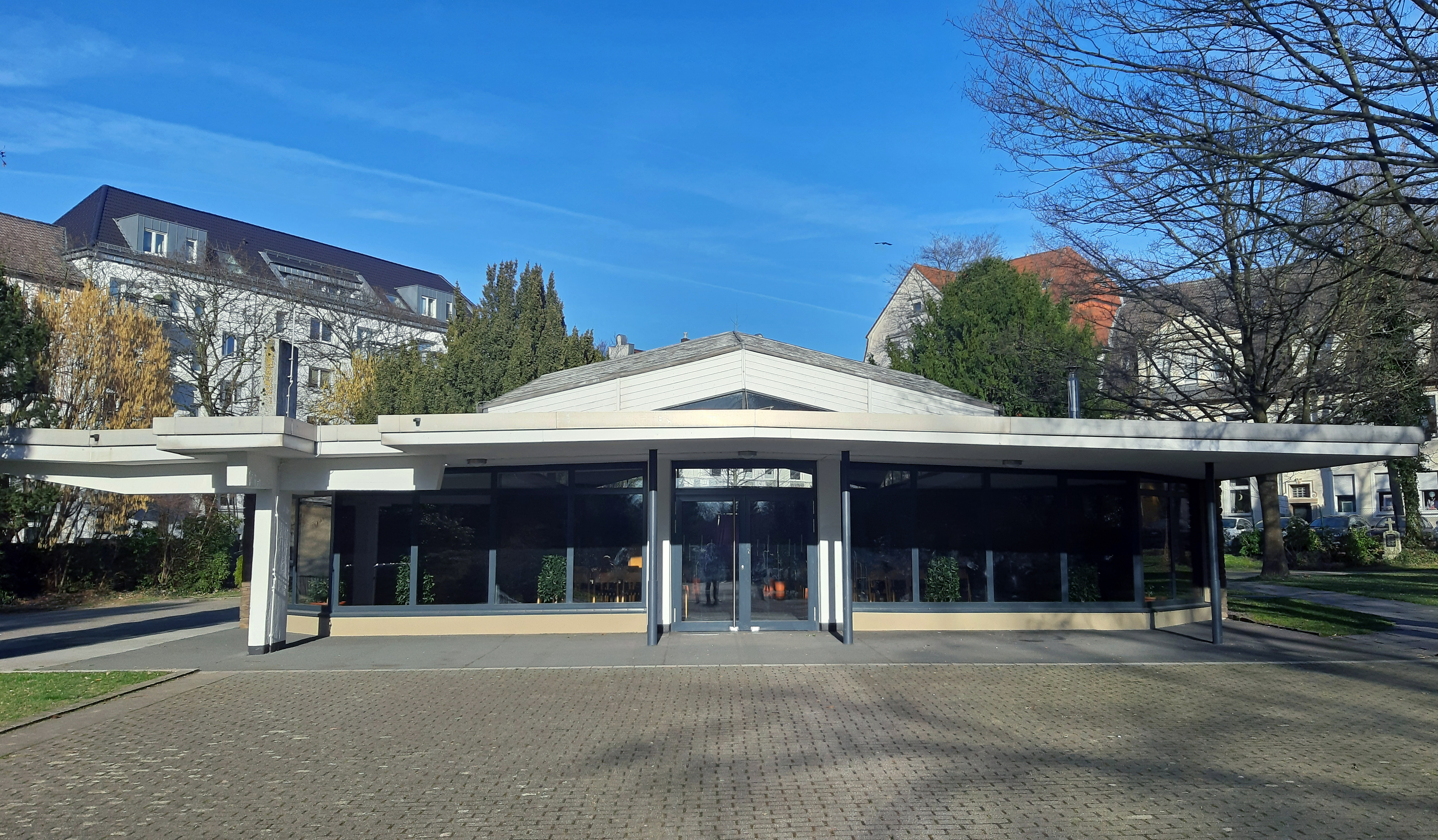 Andachtshalle des Ostfriedhofs in Essen, 1957 nach Plänen des Essener Architekturbüros Kölsch & Kölsch fertiggestellt